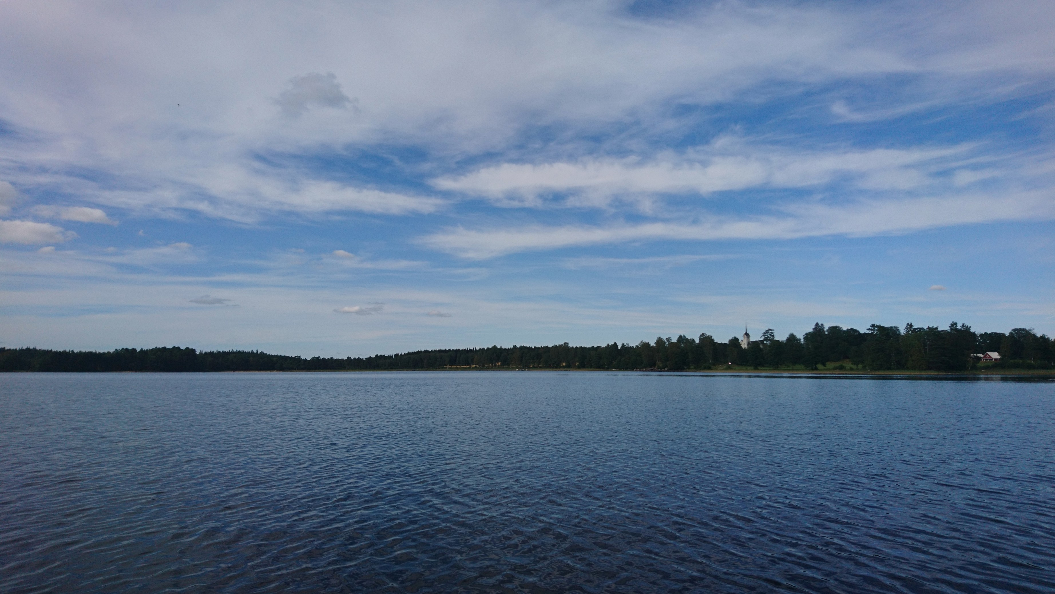 Nässjön i Mullsjö kommun